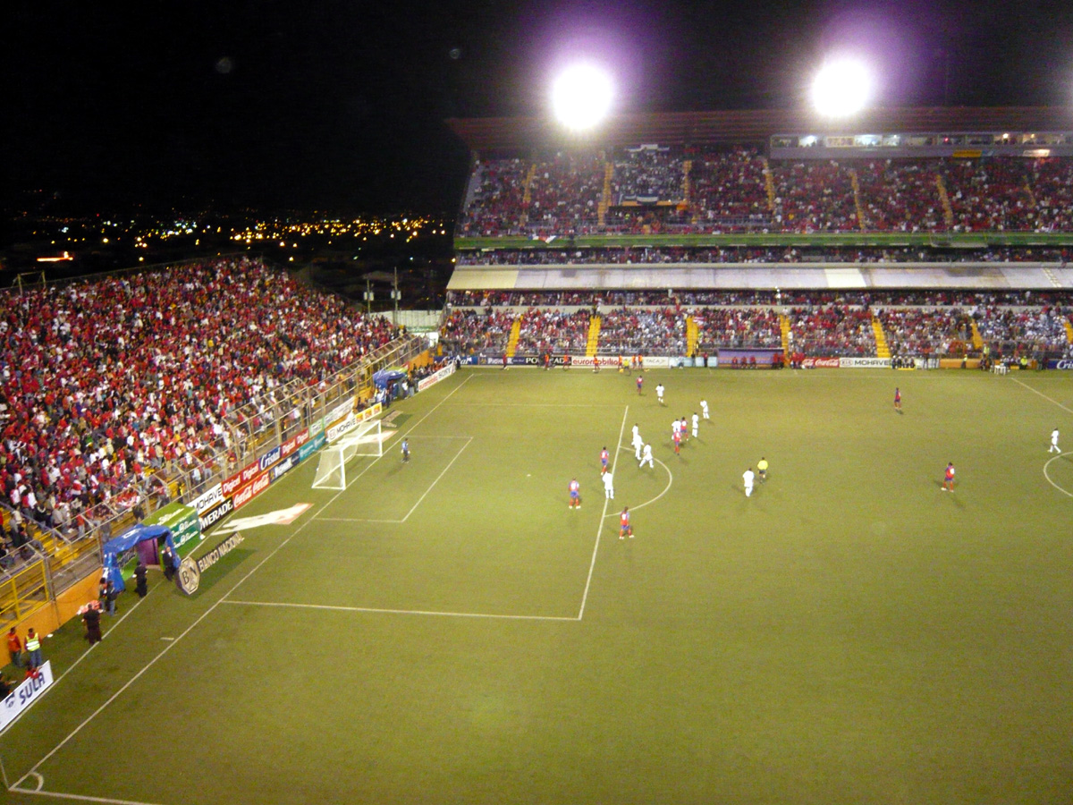 Costa Rica - Honduras på Estadio Saprissa i San José, 1. kamp i 4. runde av CONCACAFs kvalifisering til VM i fotball 2010.